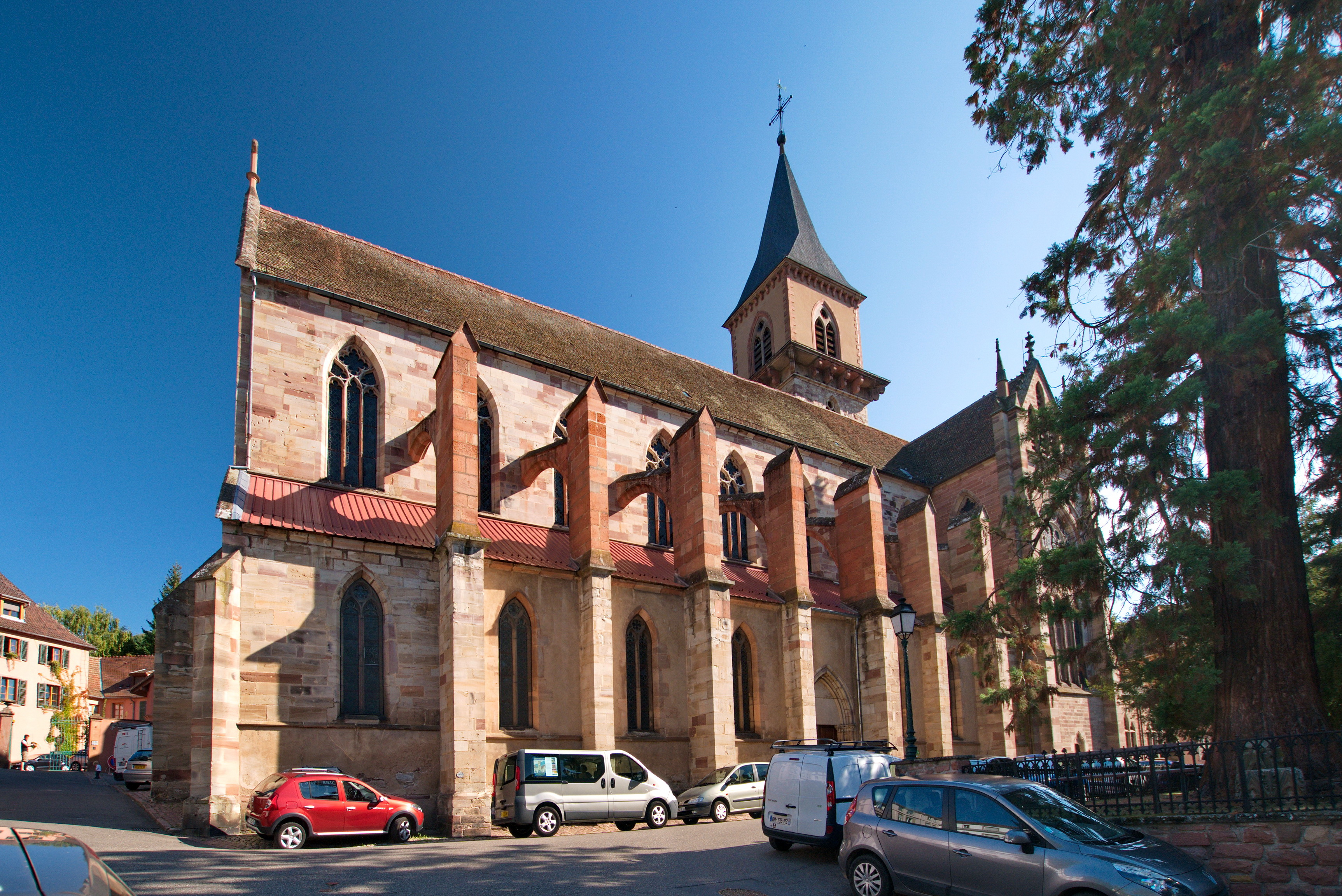 Église Saint-Gregoire de Ribeauville, Rue du Château (Classé, 1994) .